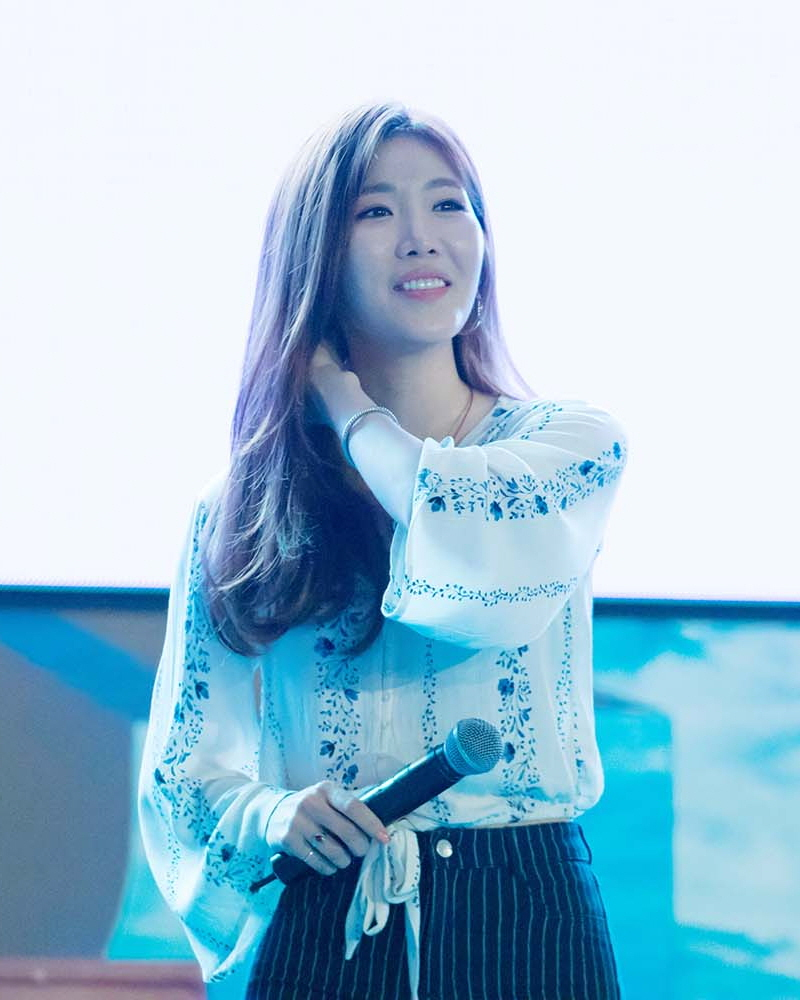 17.07.29 오션월드 놀존심콘서트 - 다비치 직찍